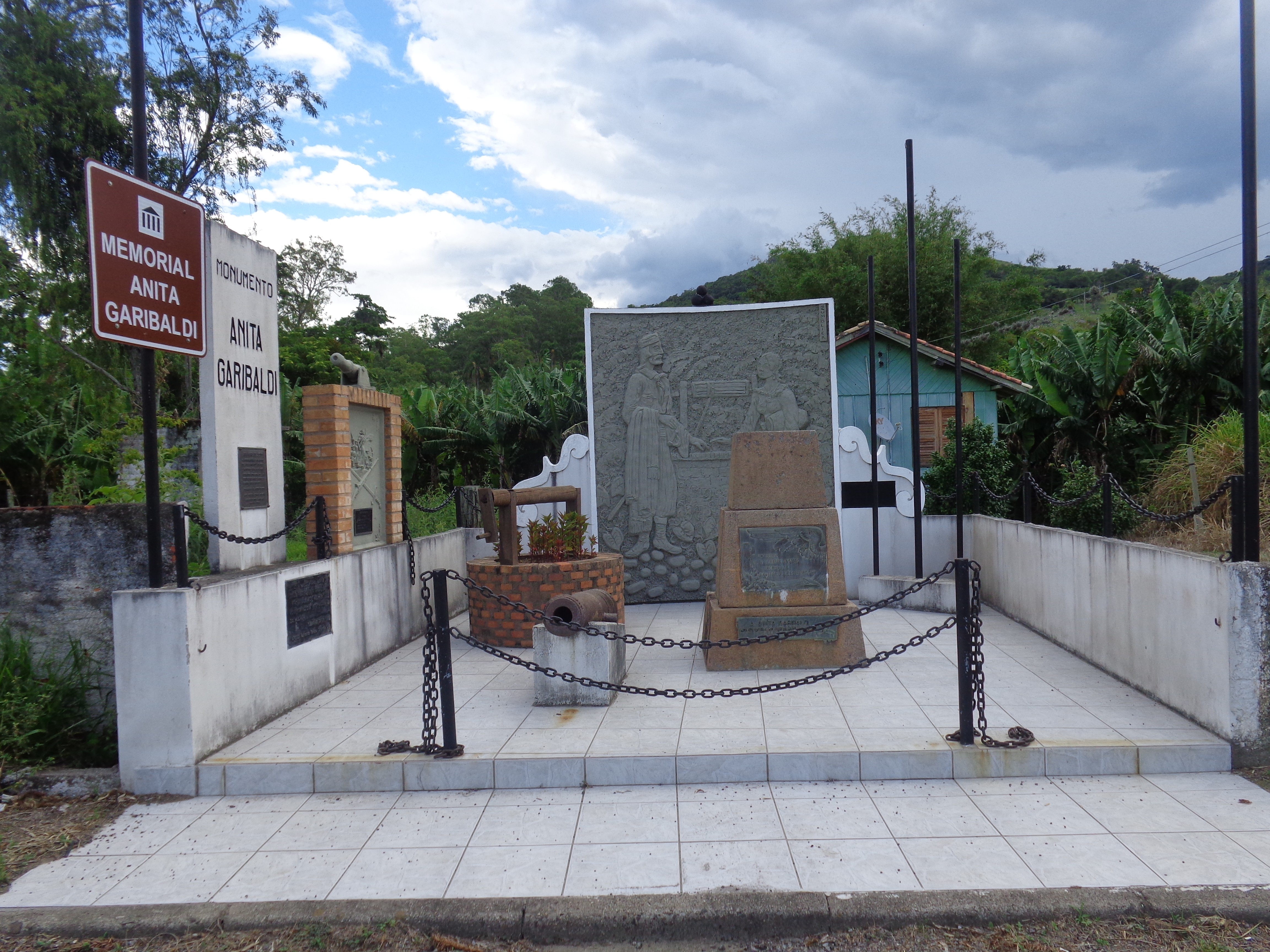 Monumento a Anita Garibaldi no local de seu nascimento em Morrinhos, Tubarão, Santa Catarina.